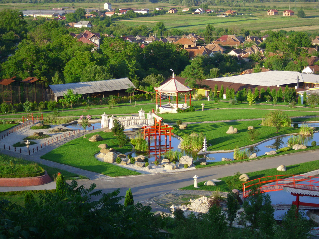 Fostul parc al Castelului Wesselenyi